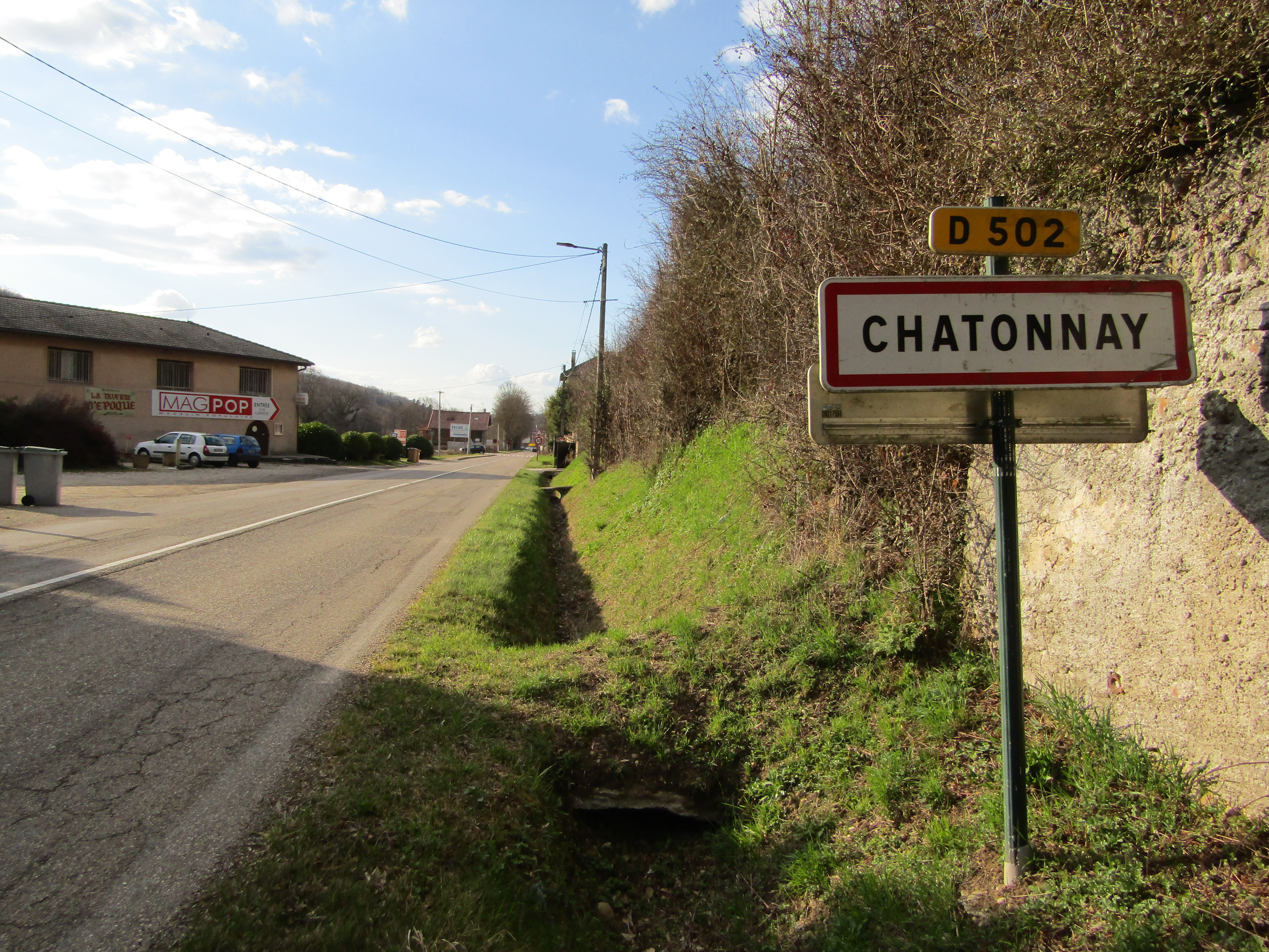 Châtonnay (entrée) en mars 2019